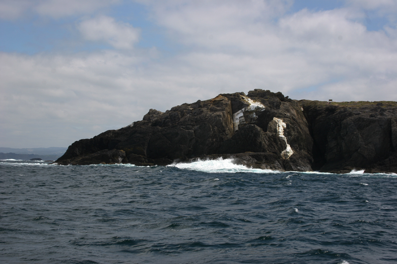 Vista do Seixo Branco (A Coruña)